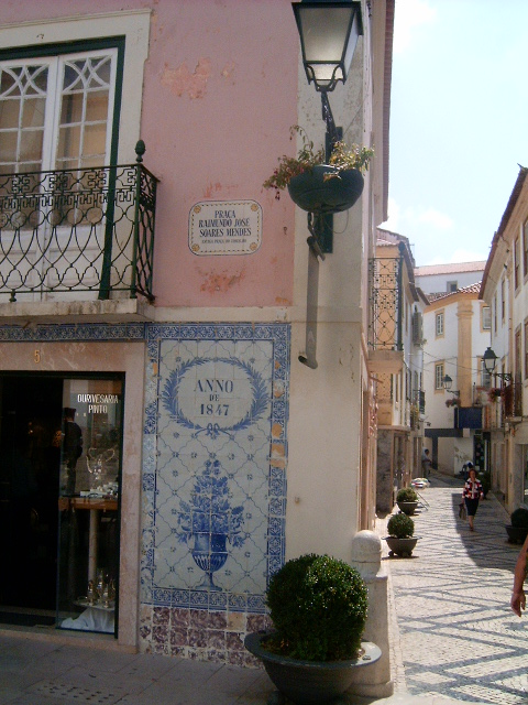 Rua típica de Abrantes, Portugal